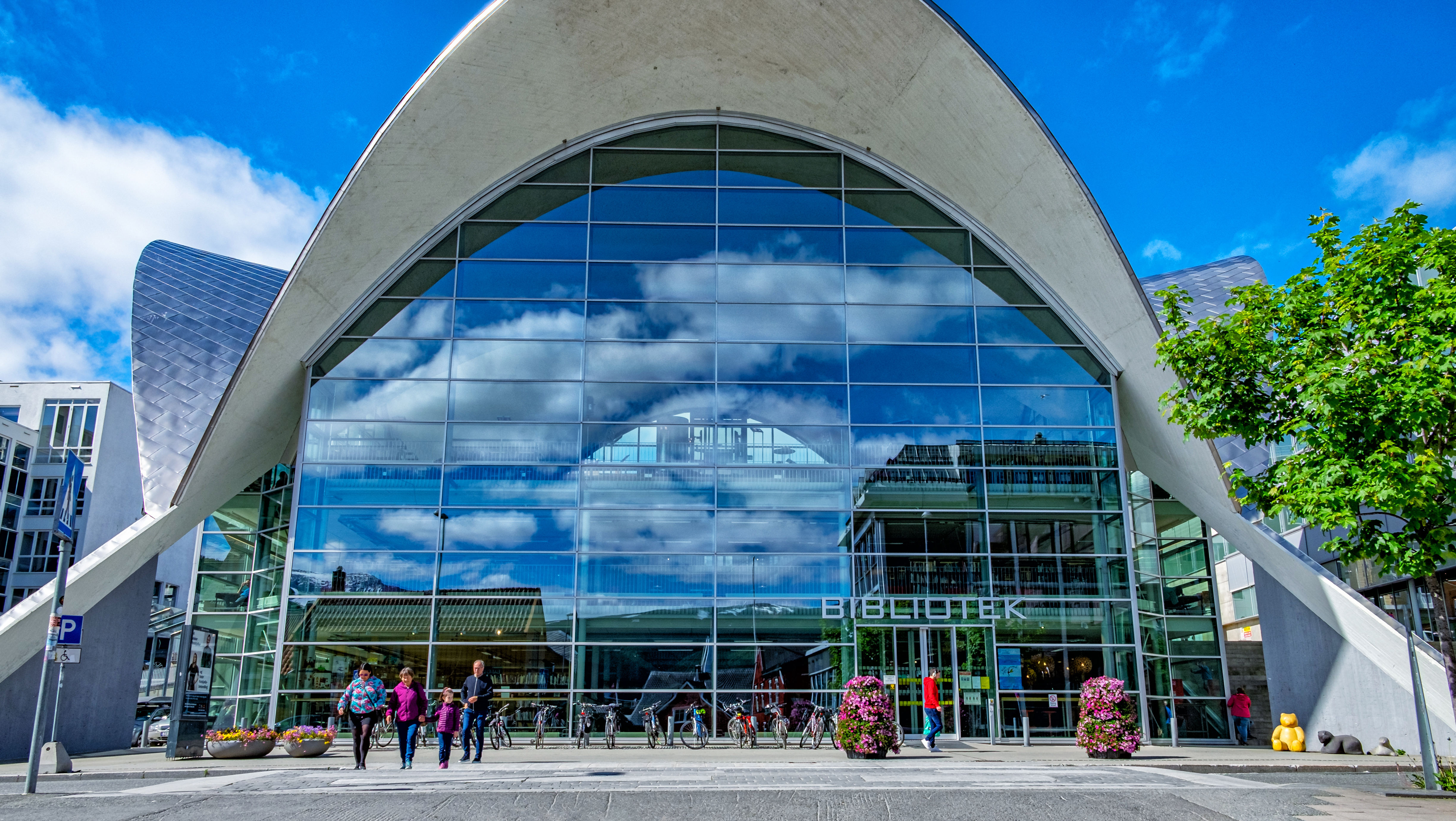 Tromsø bibliotek og byarkiv.